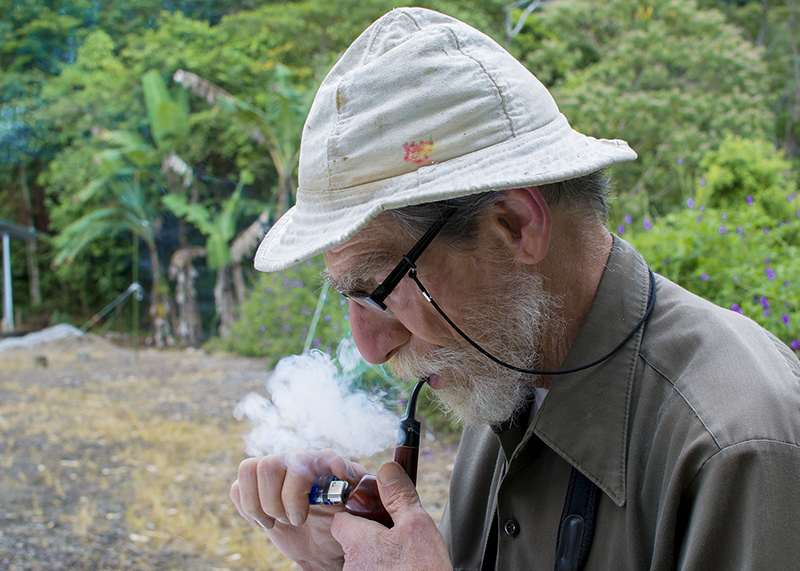 Profesor F. Gary Stiles fumando pipa en Soltis Center